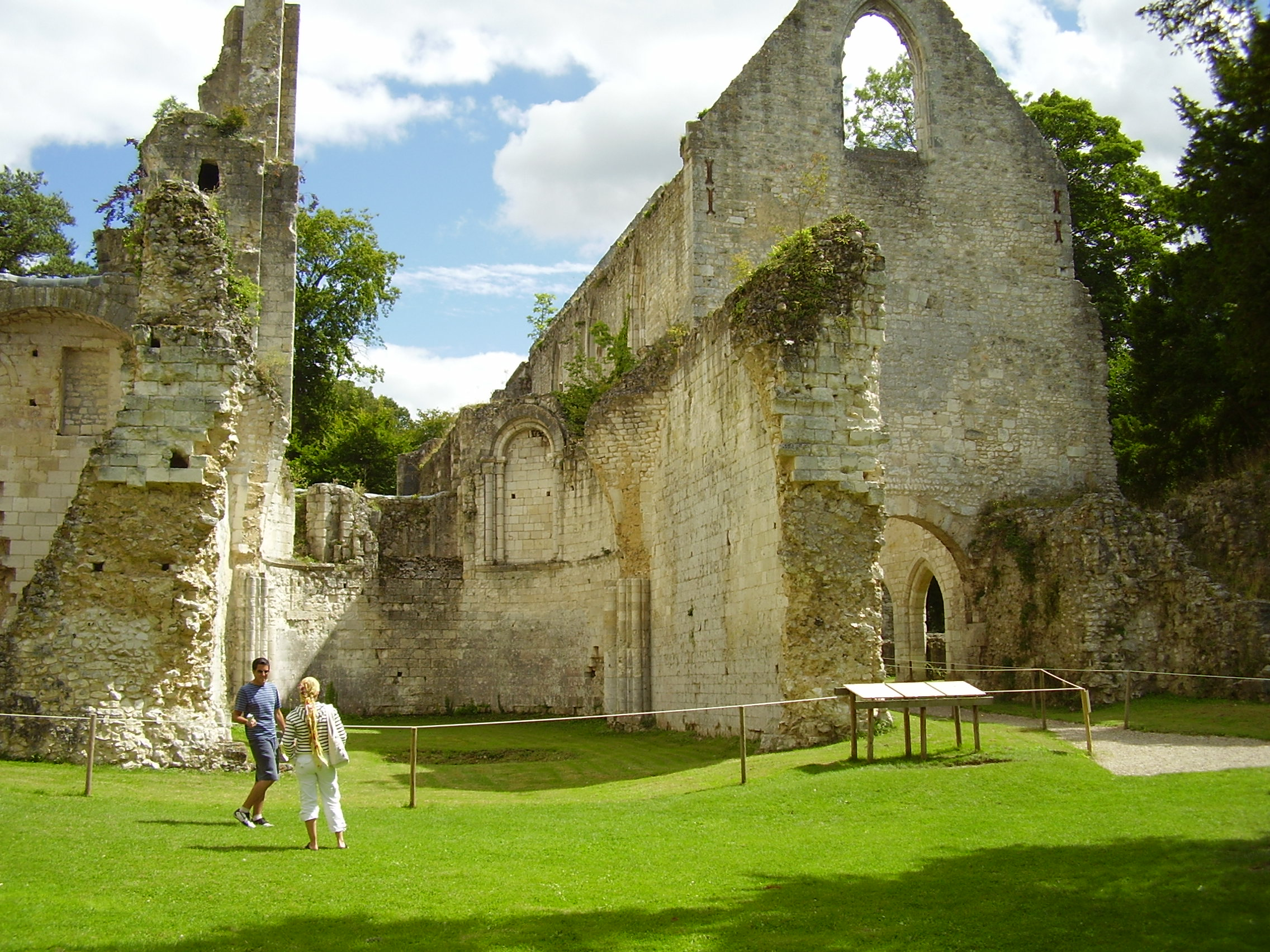 Abbaye de Jumièges, the most beautiful ruins in France